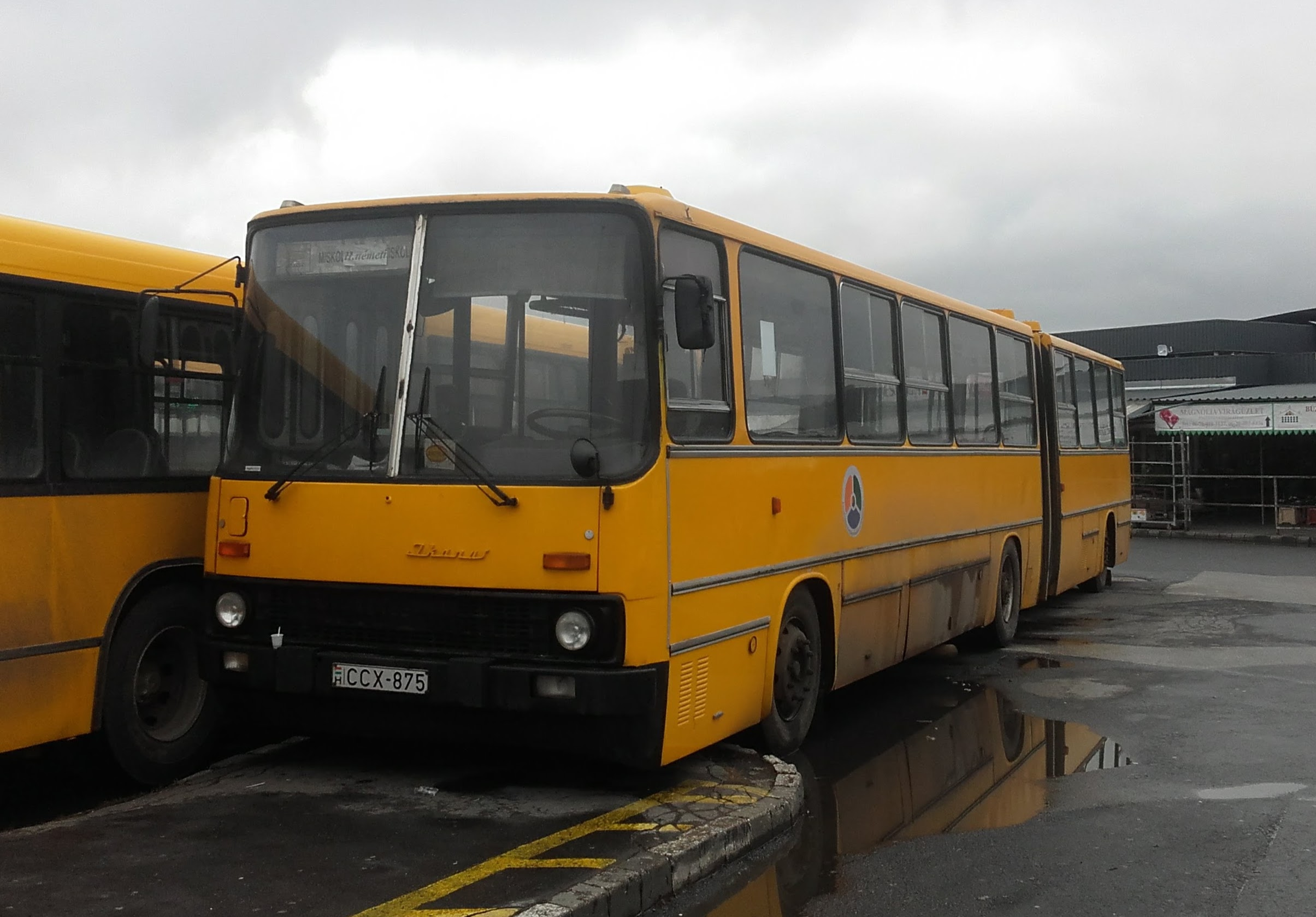 Az ÉMKK CCX-875 rendszámú Ikarus 280 típusú busza Miskolcon, a 3731-es helyközi járaton.